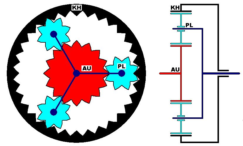 Yksinkertainen planeettavaihde